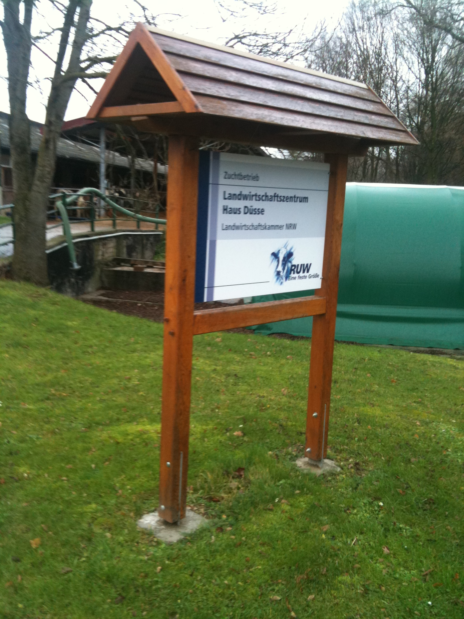 Rinder Union West, Schild am Eingang von Haus Düsse